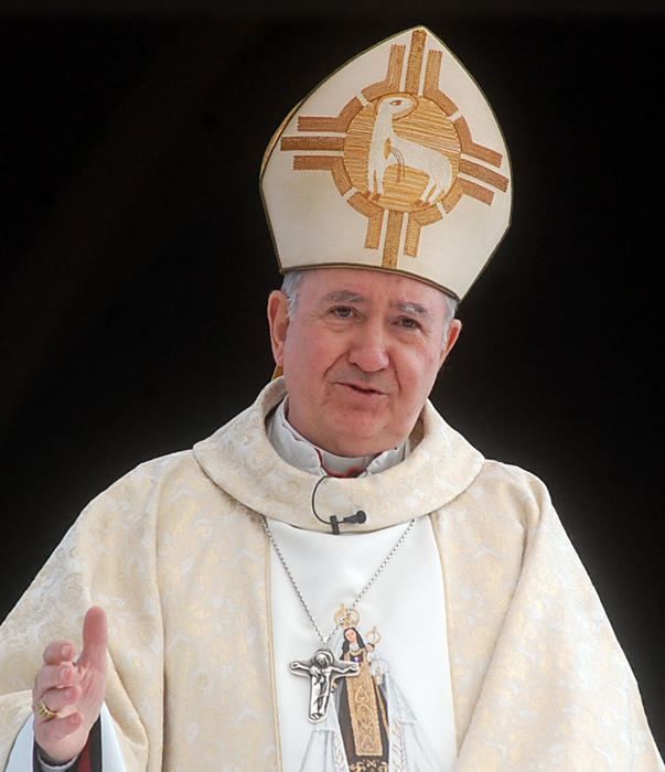 El Cardenal Francisco Javier Errázuriz Ossa I.P.S. (* Santiago de Chile, 5 de septiembre, 1933) es el Arzobispo de Santiago de Chile. En el Templo Votivo de Maipú se celebra el Día de Nuestra Señora del Carmen. 16 julio 2010.